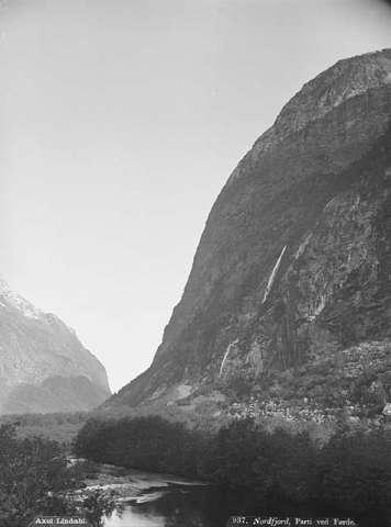 Parti ved Førde Stad: Førde i Jølster, ved Breimsvatnet